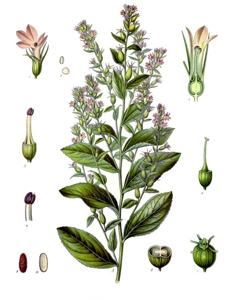 Indianertabak. A oberer Theil der blühenden Pflanze, natürl. Grösse; 1 Blüthe, vergrössert; 2 dieselbe im Längsschnitt desgl.; 3 die vom Kelche und der Krone befreite Blüthe, desgl.; 4 Staubgefässröhre, desgl.; 5 Pollen, desgl.; 6 Stempel, desgl.; 7 Kapselfrucht, desgl.; 8 dieselbe im Querschnitt, desgl.; 9 Same, desgl.; 10 derselbe im Längsschnitt, desgl.